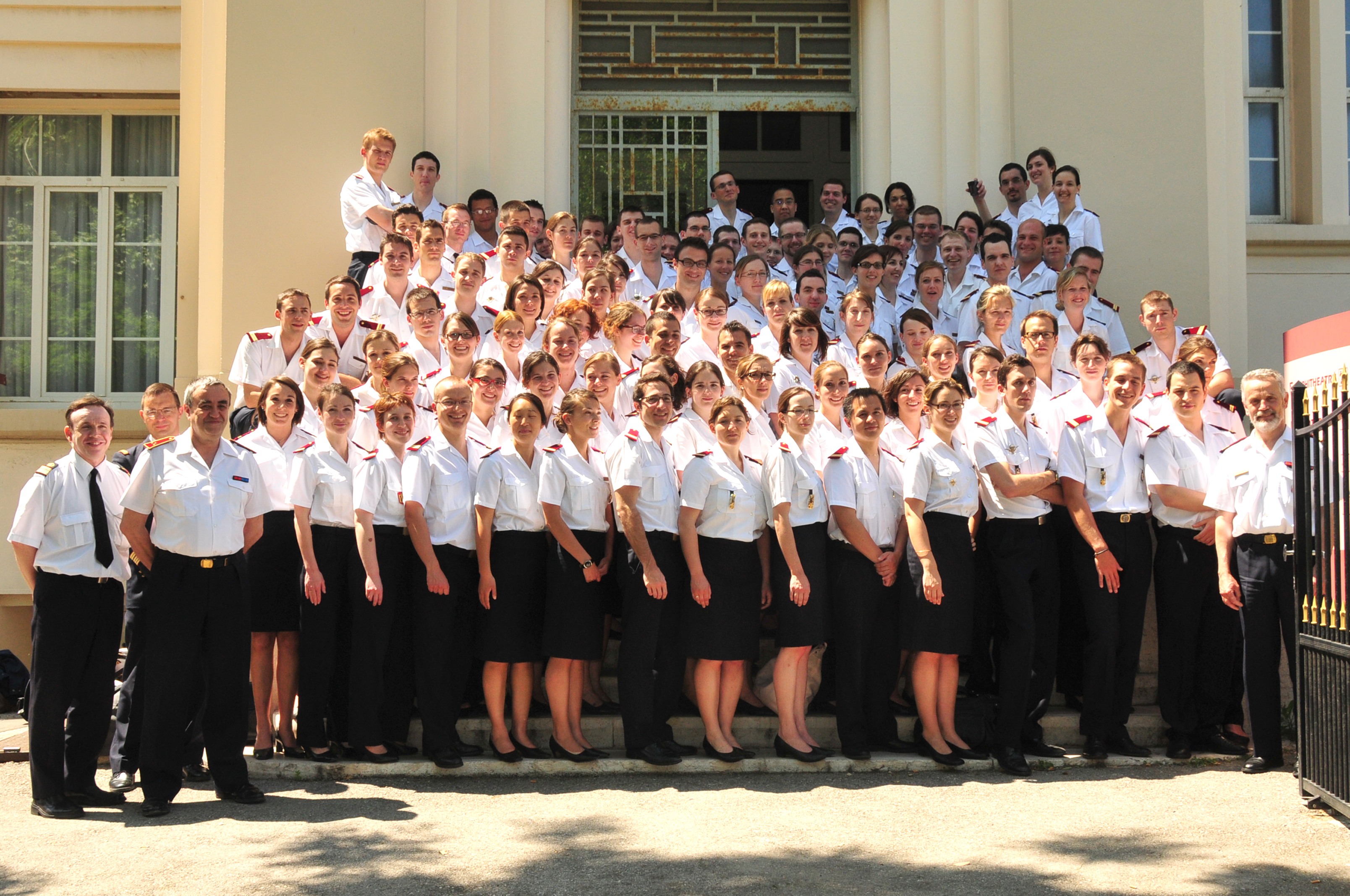 Photo de groupe de la dernière promotion d'internes des hôpitaux des armées en stage à l'Ecole du Pharo en 2011.